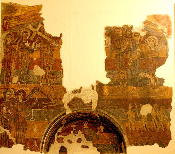 Fresc del Judici Final de Santa Maria de Taüll, al Museu Nacional d'Art de Catalunya.